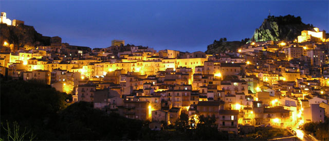 Notturno Nicosiano. Veduta notturna da piazza Santa Maria di Gesu'